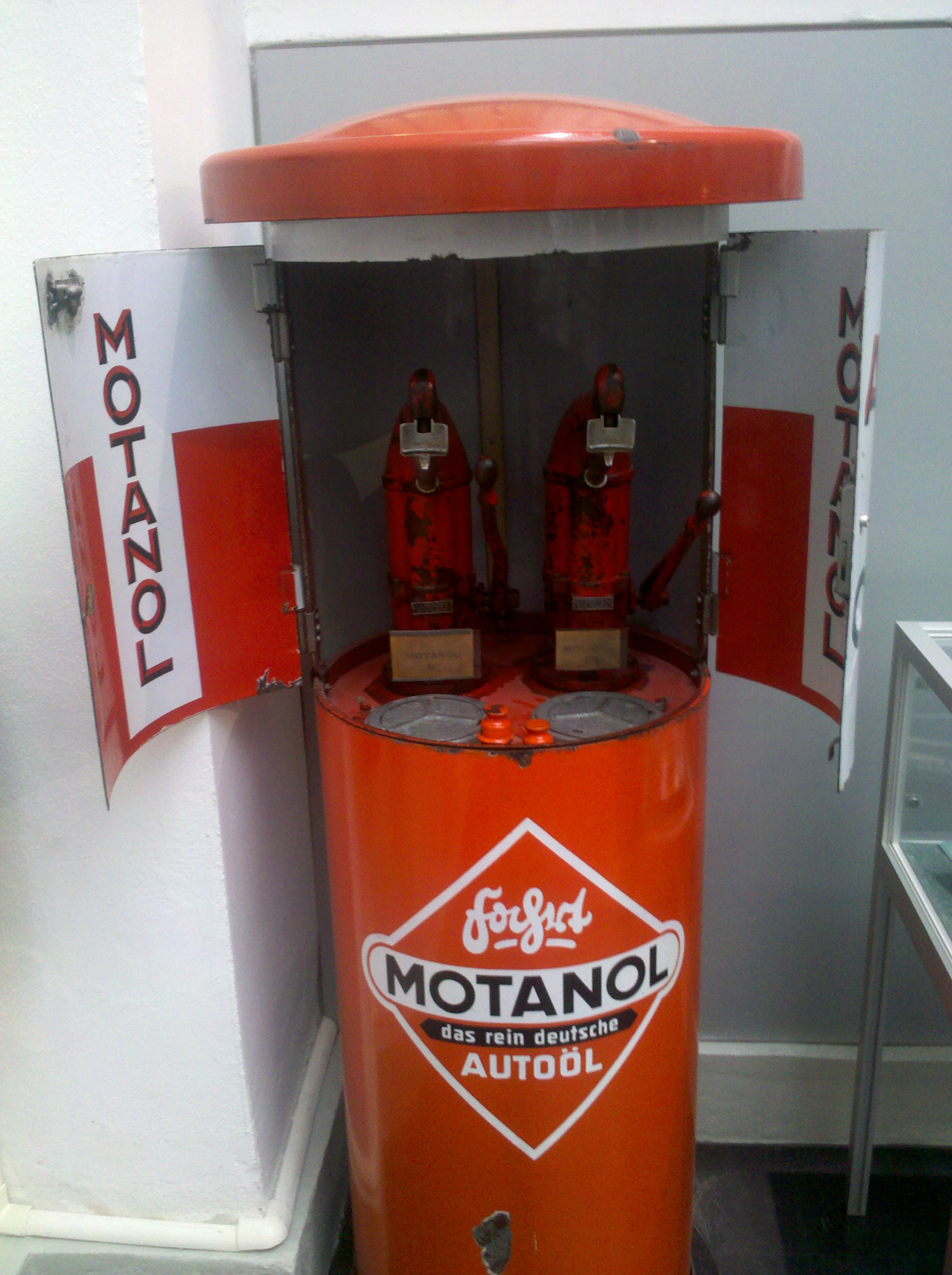 Motanol Öl